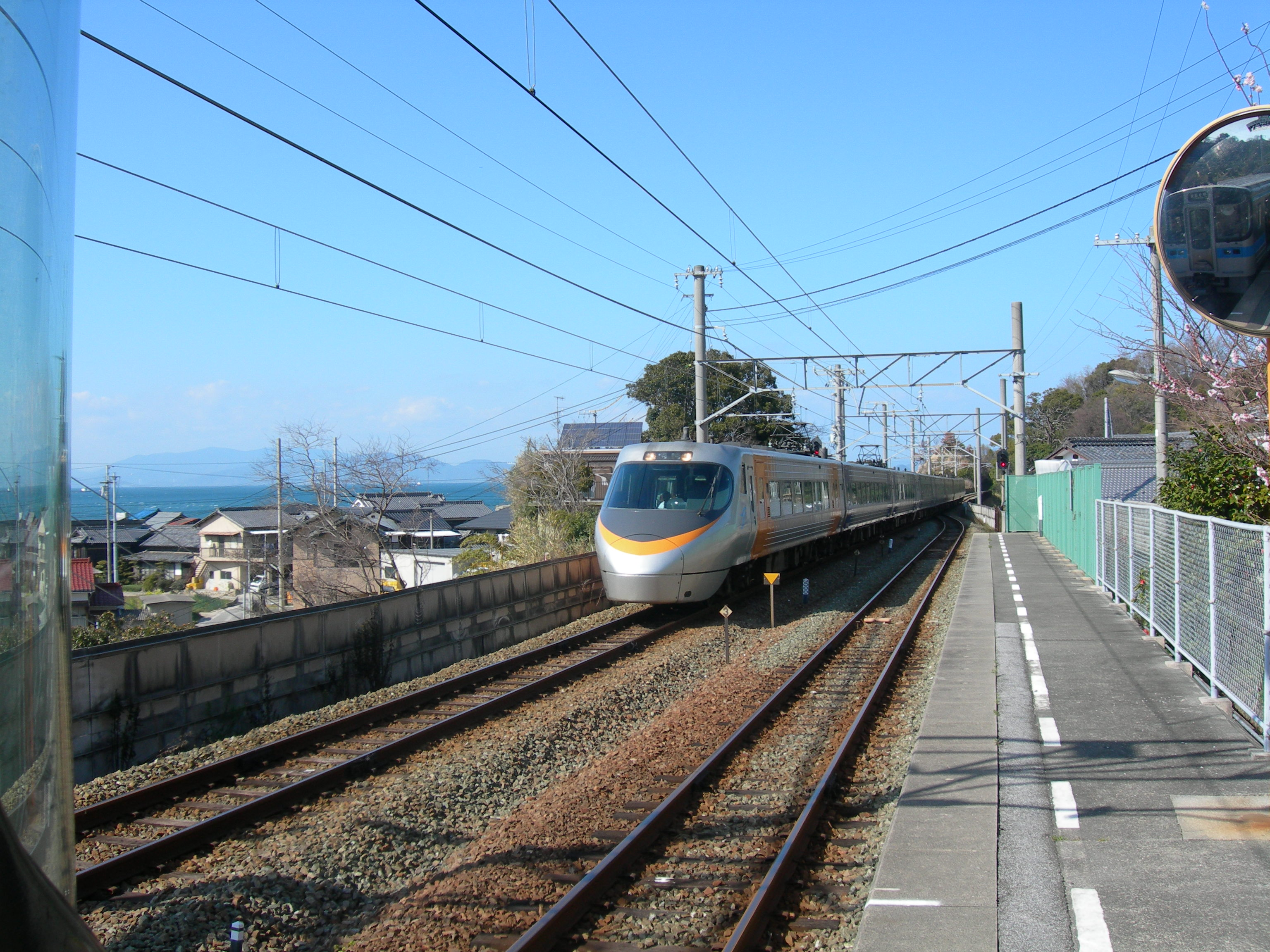 大浦駅プラットホーム